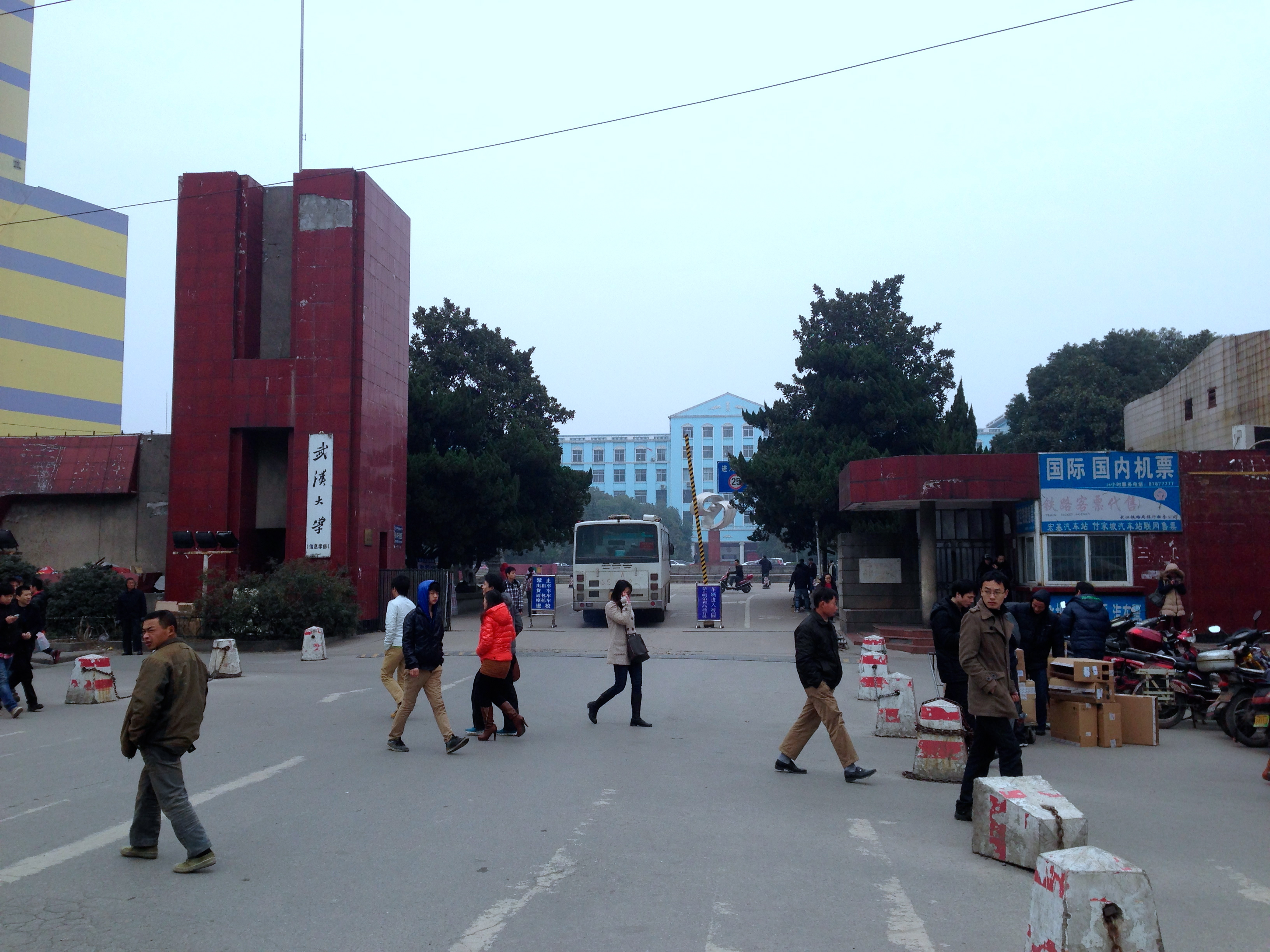 中文（中国大陆）: 武汉大学信息科学学部